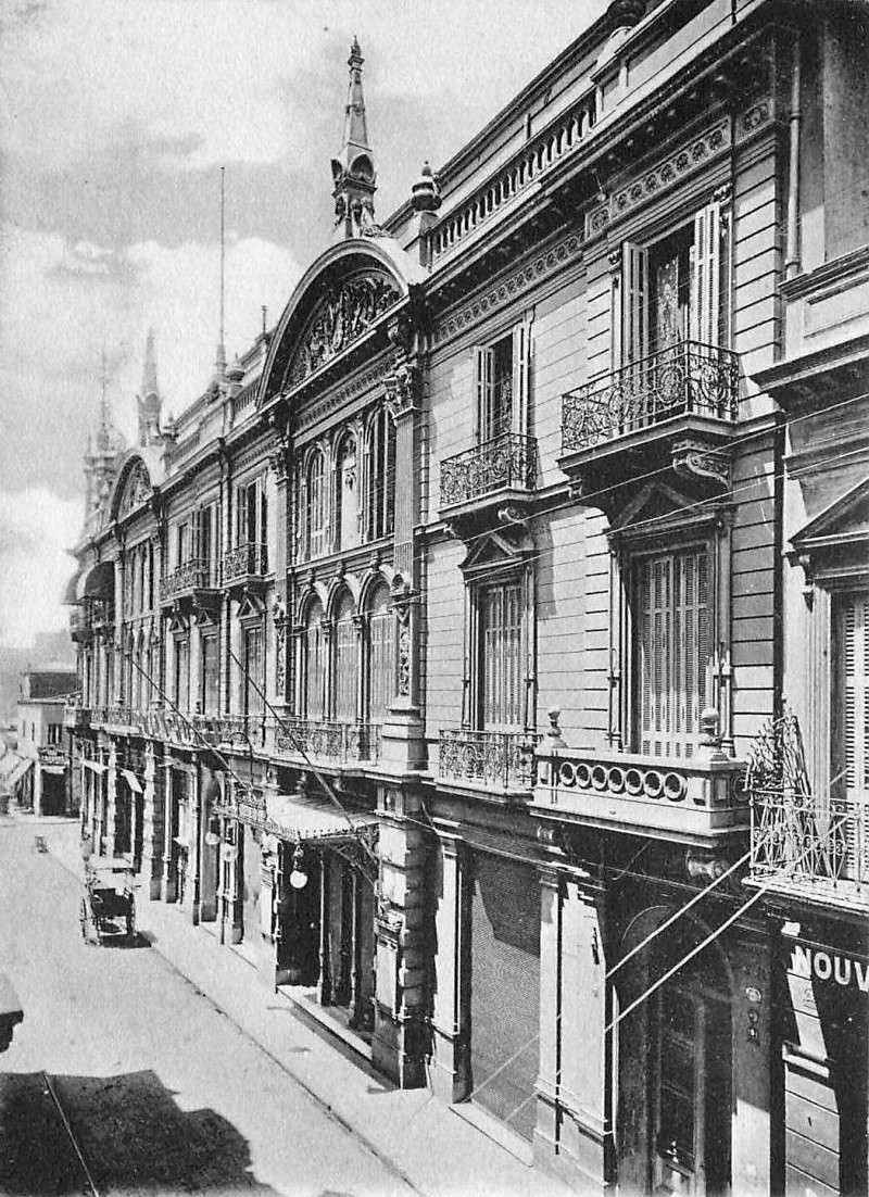 Vista desde la calle Esmeralda del Royal Hotel en la esquina con la calle Corrientes en Buenos Aires. También sede del Teatro Odeón, fue demolido en 1991.